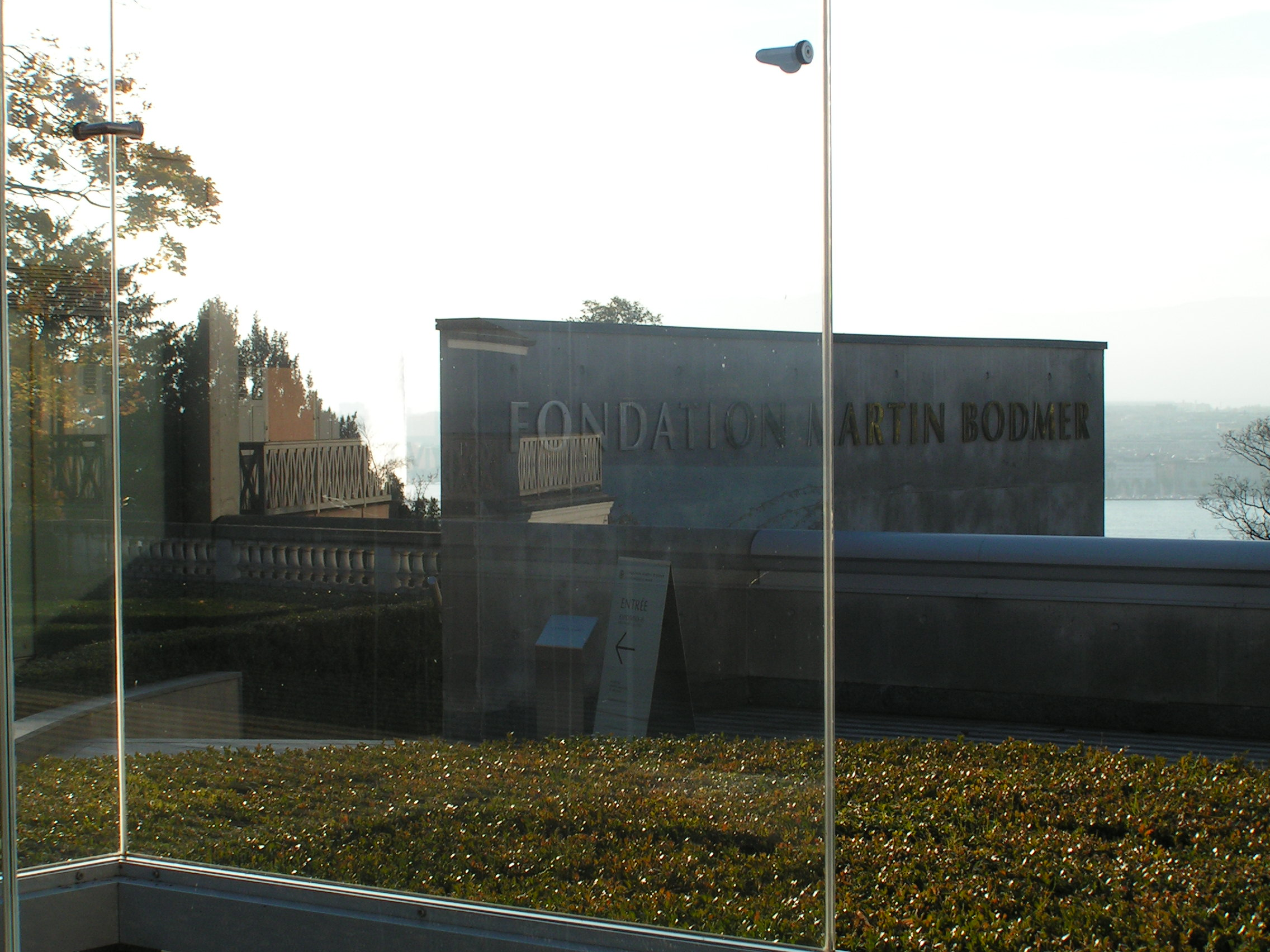 Fondation Martin Bodmer à Cologny, Genève